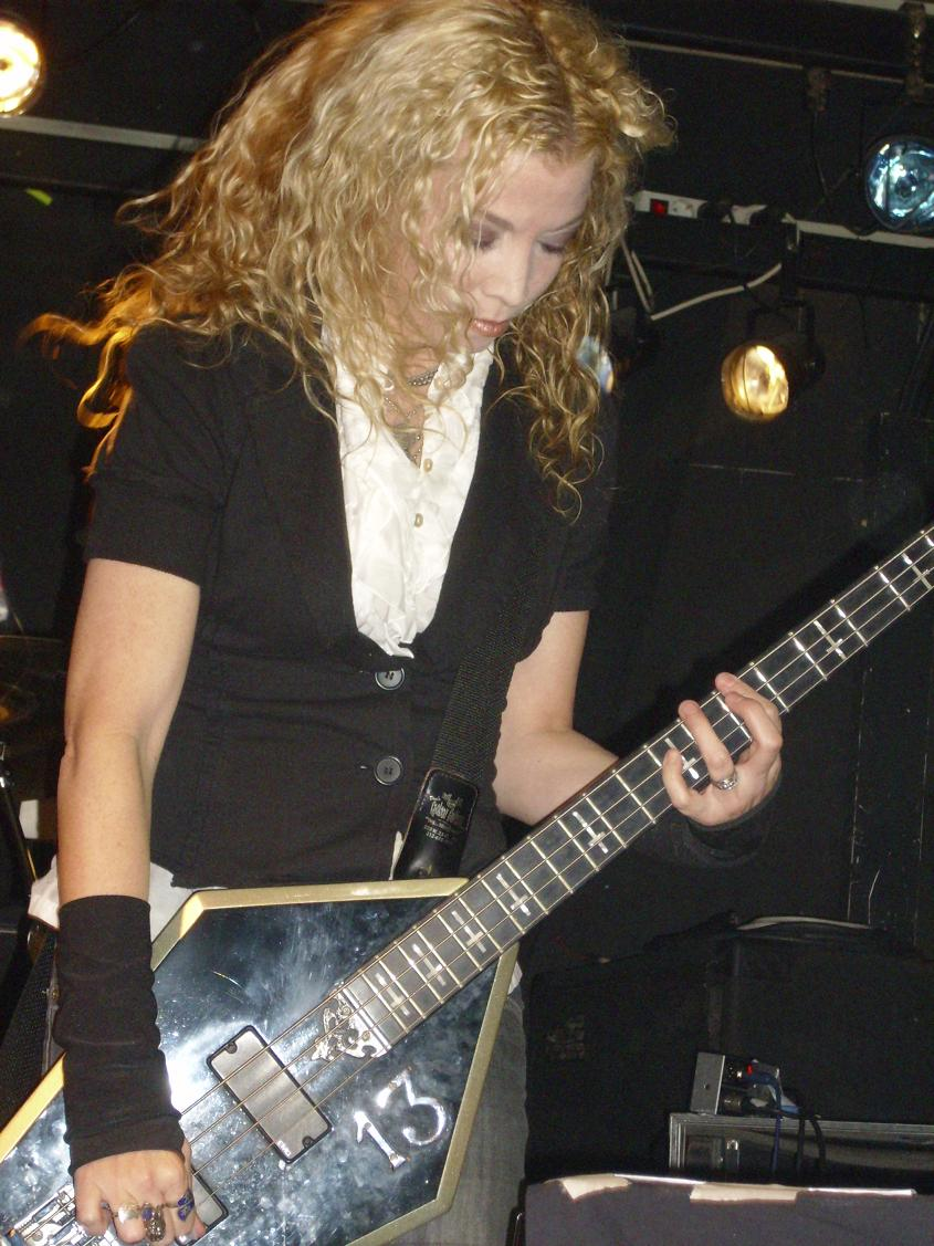 Sean Yseult, bajista de Rock City Morgue, actuando en la Sala Gruta 77 (Madrid),el 11 de abril 2010.